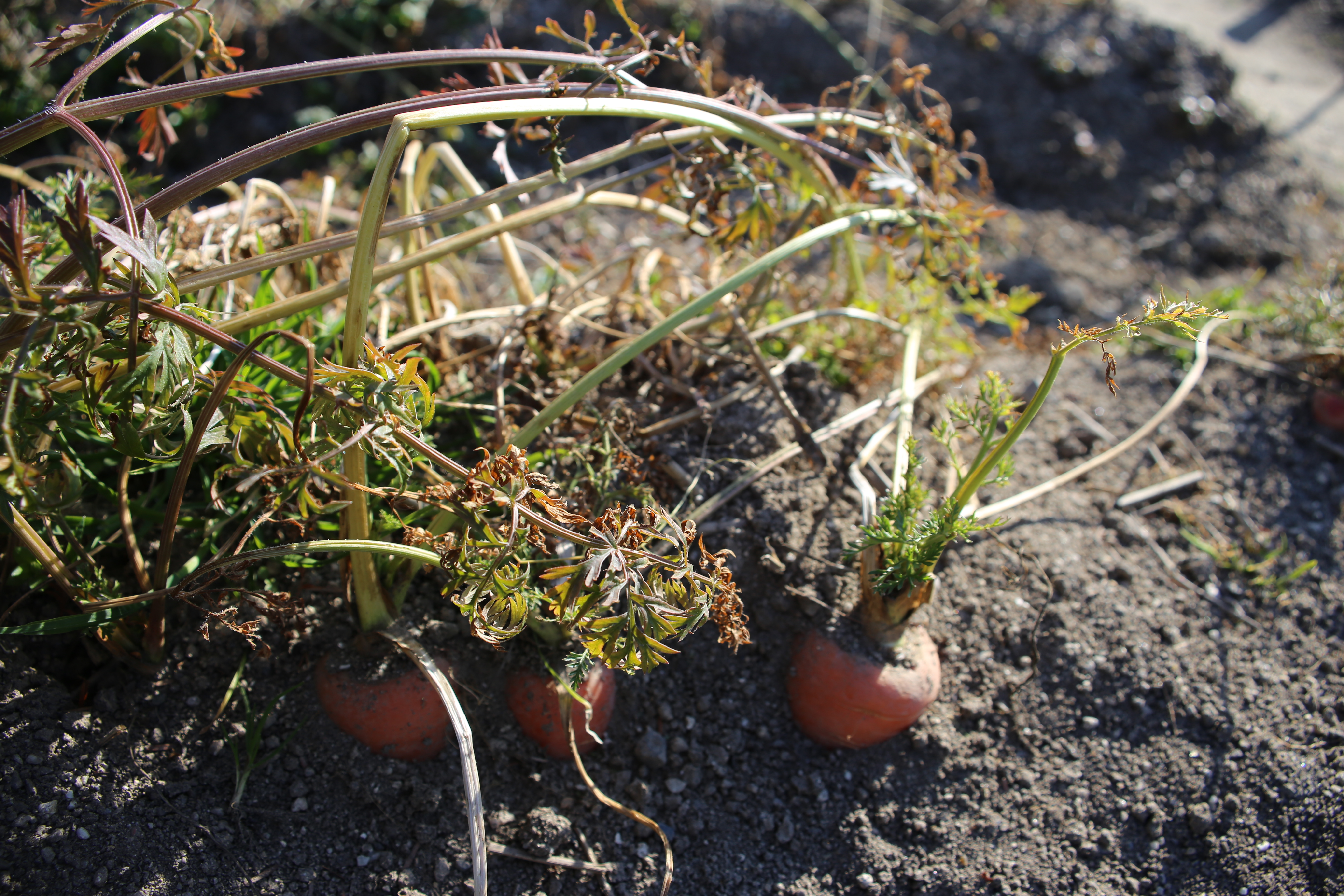 名古屋市天白区の名古屋市農業センター内の畑に栽培されている八事五寸人参の様子